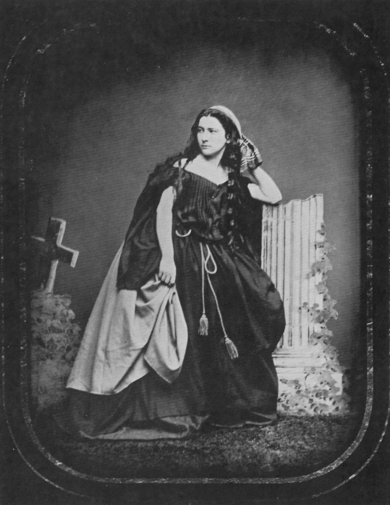 Originale Bildunterschrift: Die Tragödin Charlotte Wolter als »Deborah«